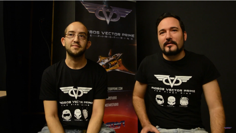 Juán Damian Reina y Rafael Casaucao